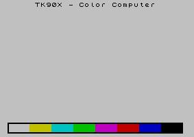 Tela Inicial do Microcomputador TK90X